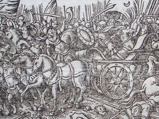 Virgil Solis, Achille sfida a duello Cicno (edizione 1581), Ovidio, Metamorfosi, libro XII, 105-121.